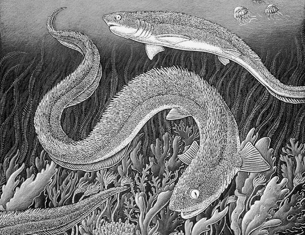 An artist’s view of a possible life restoration of the chondrichthyan Listracanthus with the large type I−denticles restored along the dorsal ridge (Artwork © Ray Troll, 2001).